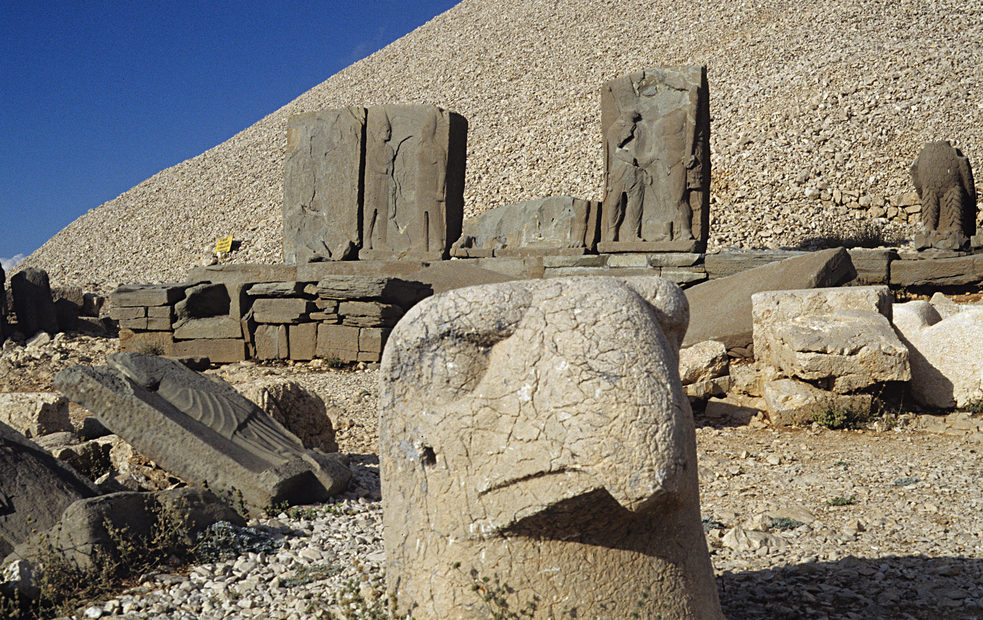 Dexiosisreliefs hinter Adlerkopf, von links Antiochos mit Kommagene, Apollon, Zeus (Fragment), Herakles, rechts fehlend das Löwenhoroskopvorn links vermutlich Reliefs der griechischen Ahnen, Nemrut Dağı, Südosttürkei, Westterrasse.